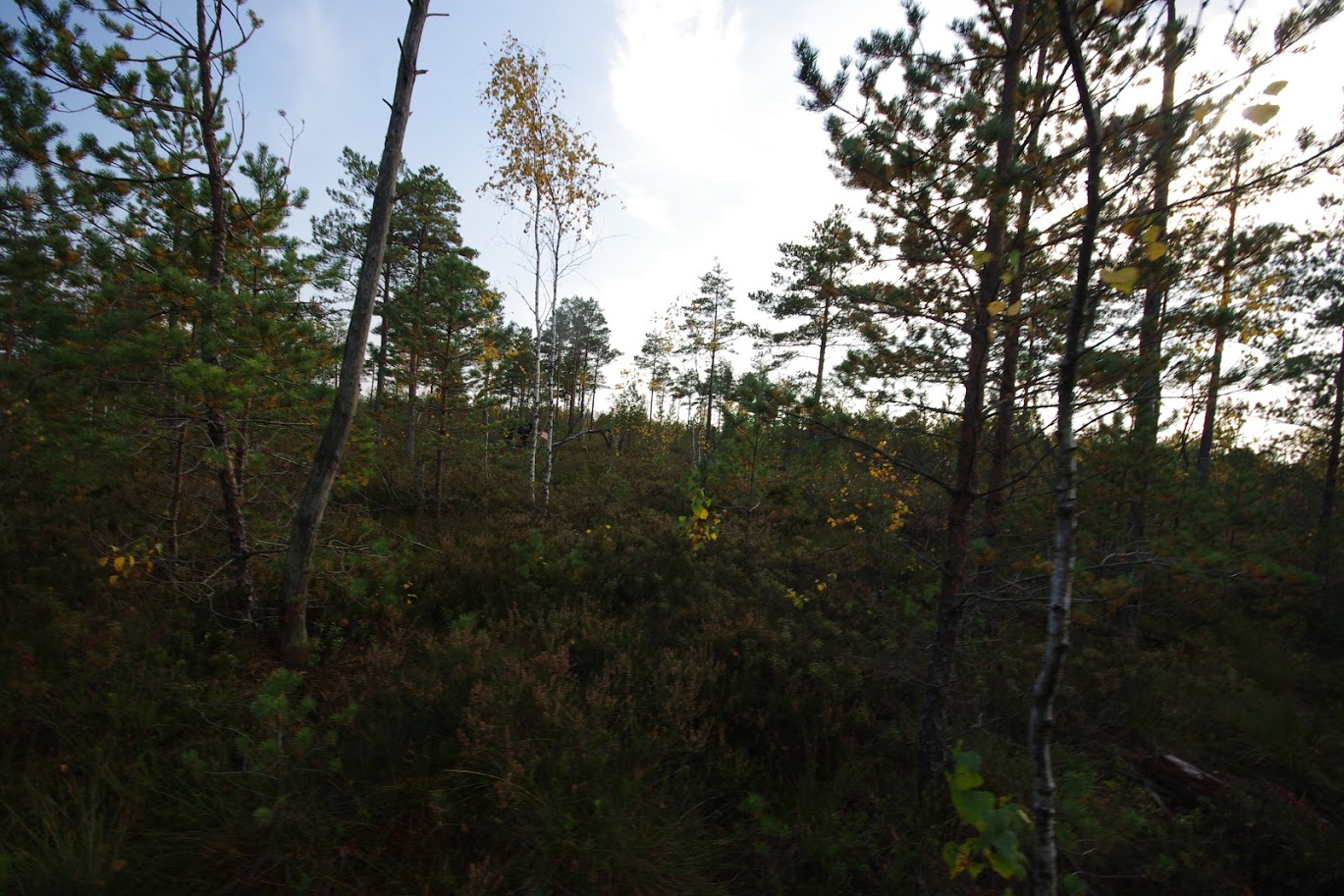 Alionių pelkės masyvas Alionių telmologiniame draustinyje